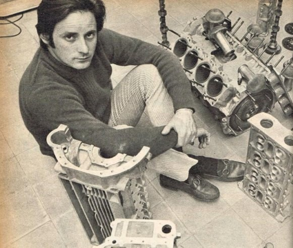 Oreste Berta en 1971, en un reportaje con la Revista Gente.